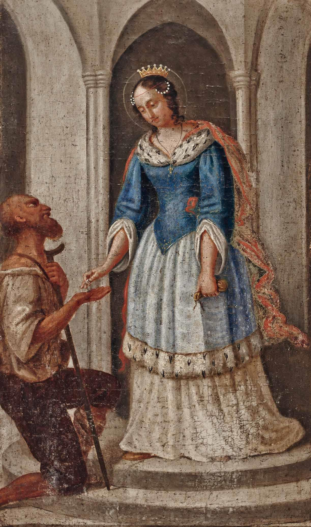 "Die Hl. Elisabeth verteilt Almosen", Öl auf Leinwand, ca. 70 x 41 cm